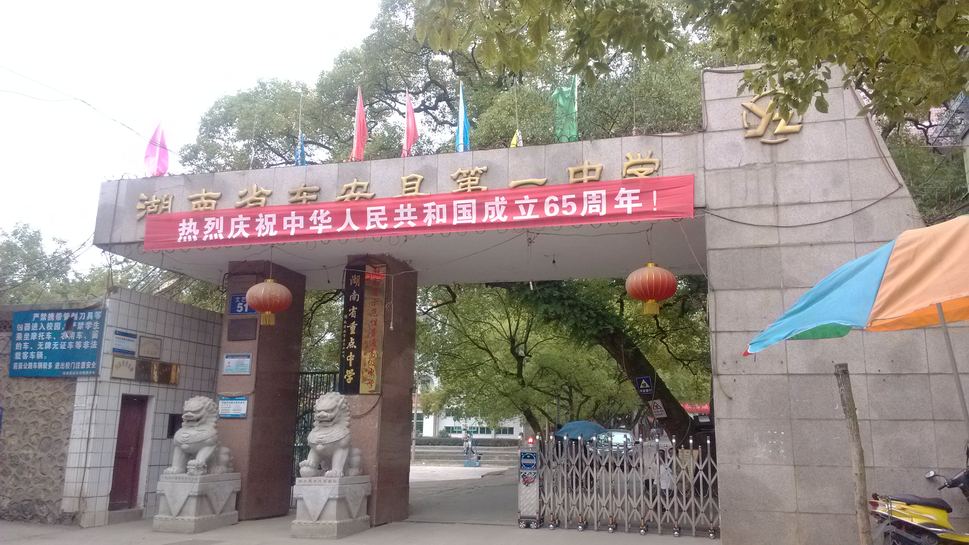 中文（中国大陆）: 拍摄于2014年10月3日